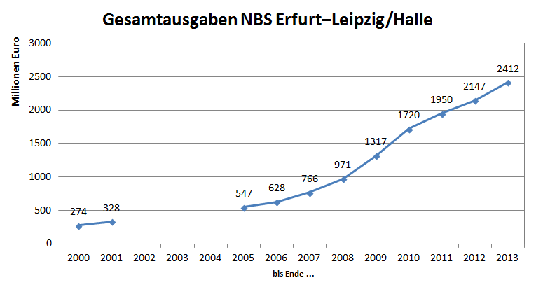 Gesamtausgaben für die Neubaustrecke Erfurt‒Leipzig/Halle kumuliert nach Jahren. Quellen: Bundesverkehrswegeplan 2003 Investitionsrahmenplan 2006-2010 Sachstandsberichte VDE 2007-2013